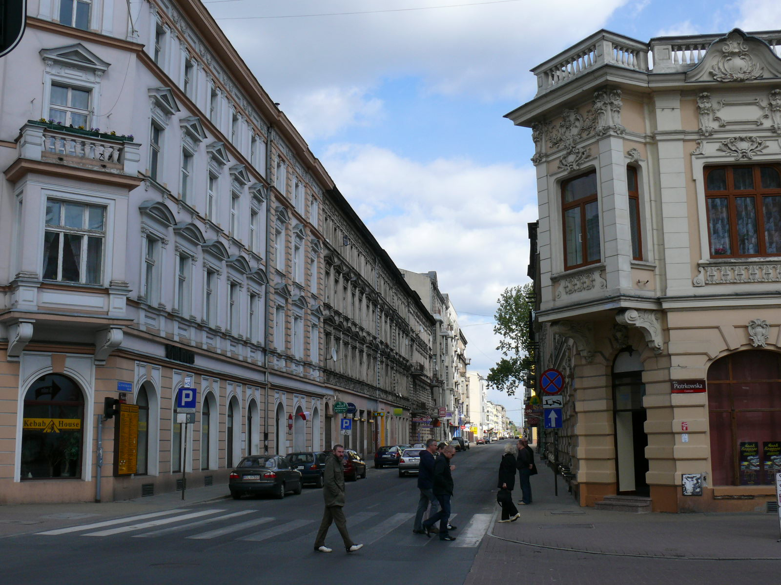 ulica Nawrot w Łodzi